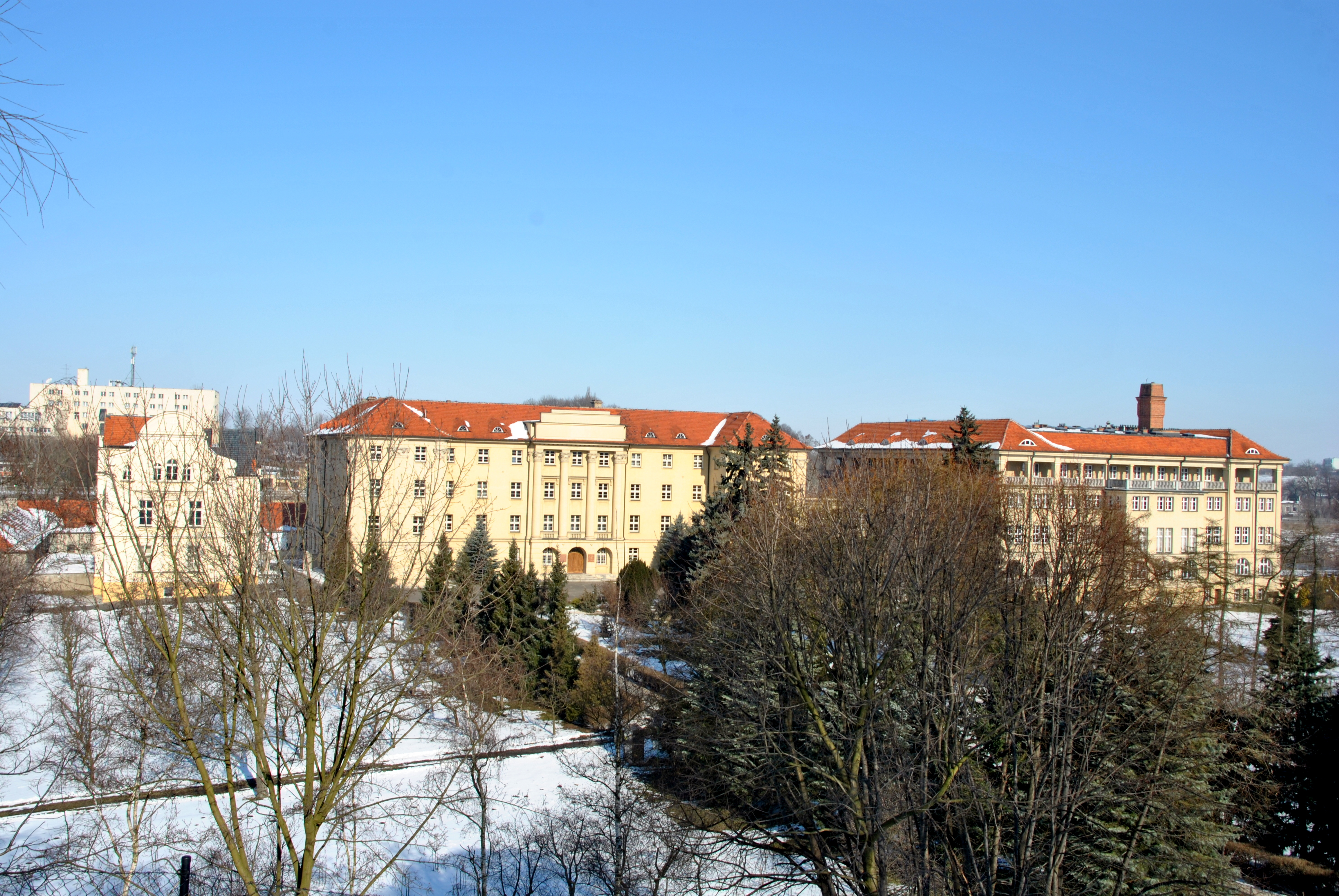 PWSD w Gnieźnie